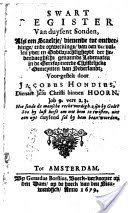 Voorpagina van het in 1679 in Amsterdam door Gerardus Borstius gedrukte boek